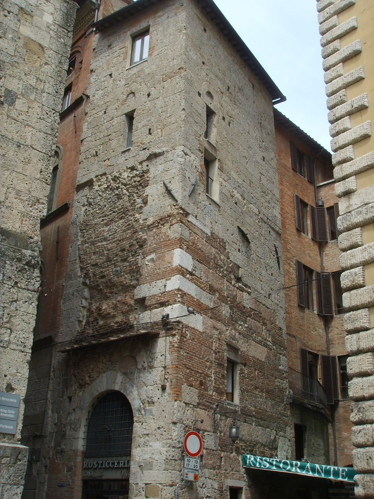 Torre dei montanini, siena